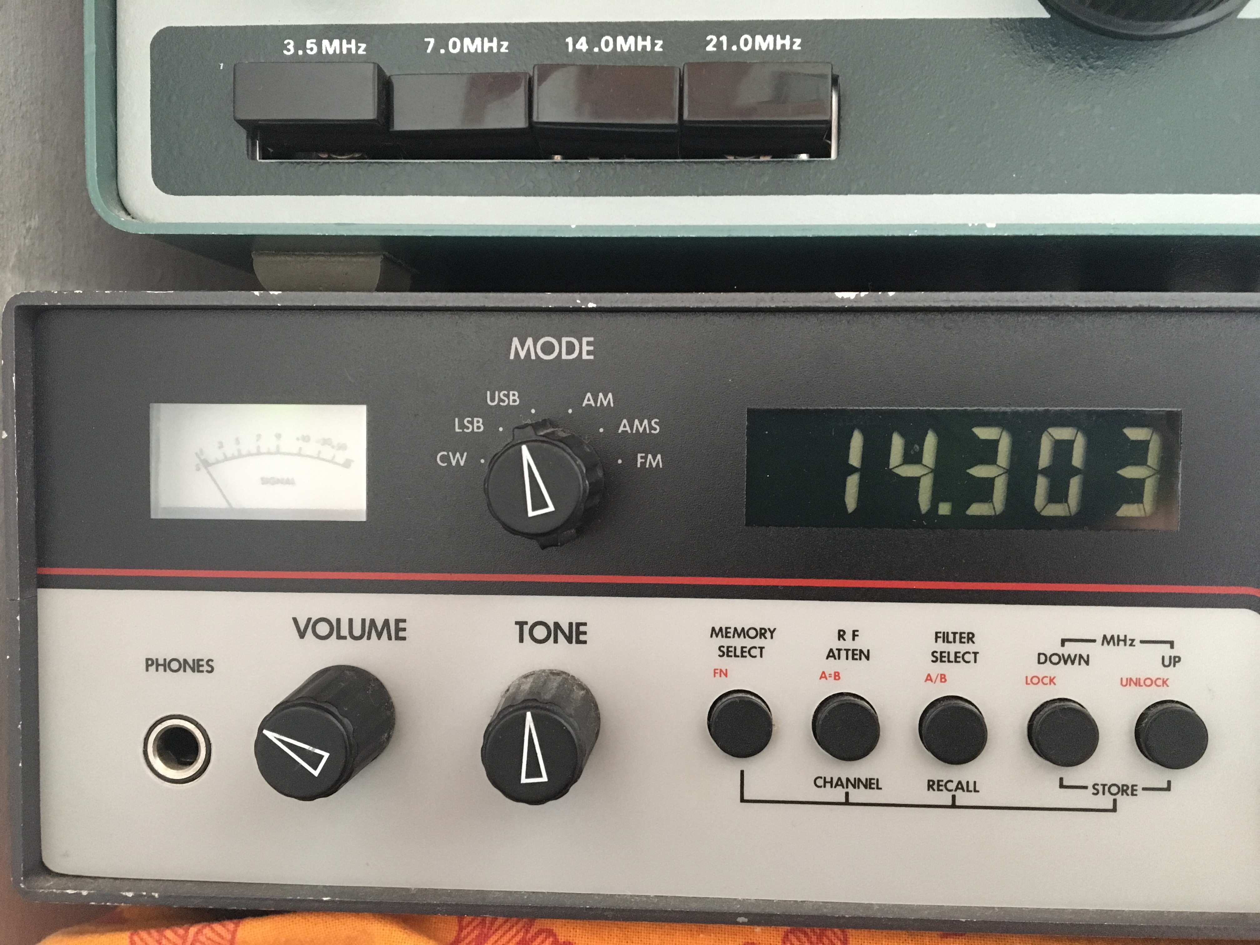 Réception (écoute sur 14303 kHz) utilisé pour l'écoute des appels d'aide internationale humanitaire entre radioamateurs en USB. Récepteur Lowe HF225, 30kHz à 30MHz.